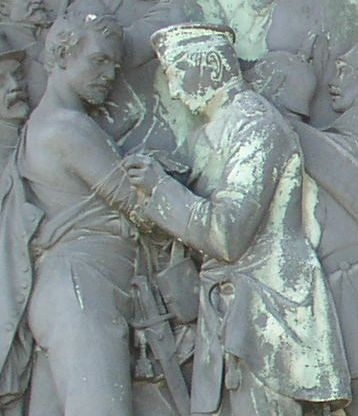 Karl Keil: Generalarzt Dr. Wilms versorgt einen verwundeten Soldaten. Detail aus dem Relief 1870/71, an der Berliner Siegessäule